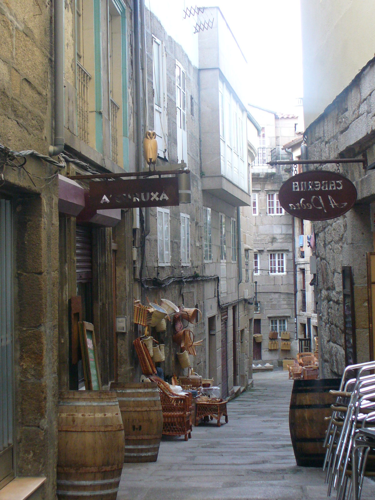 Strato de la korbofaristoj, Vigo